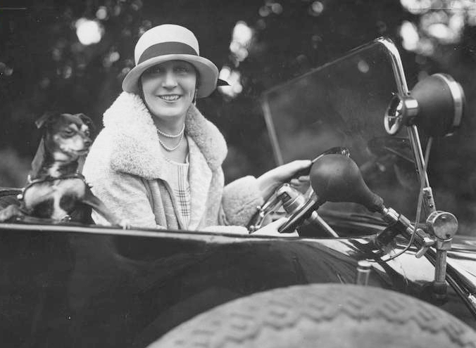 Elna Gistedt (1895-1982)